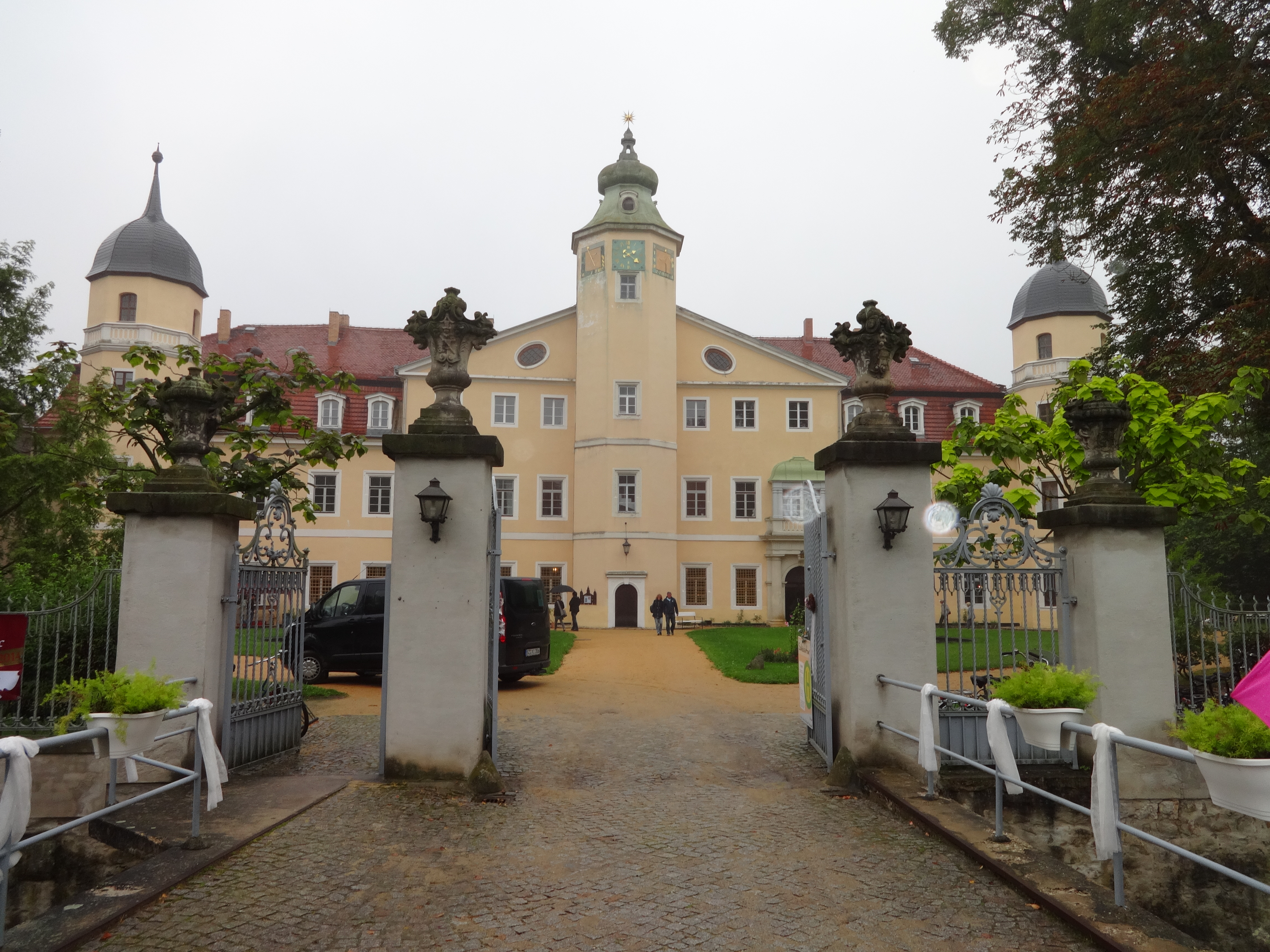 Eingang und Südfassade von Schloss Hermsdorf